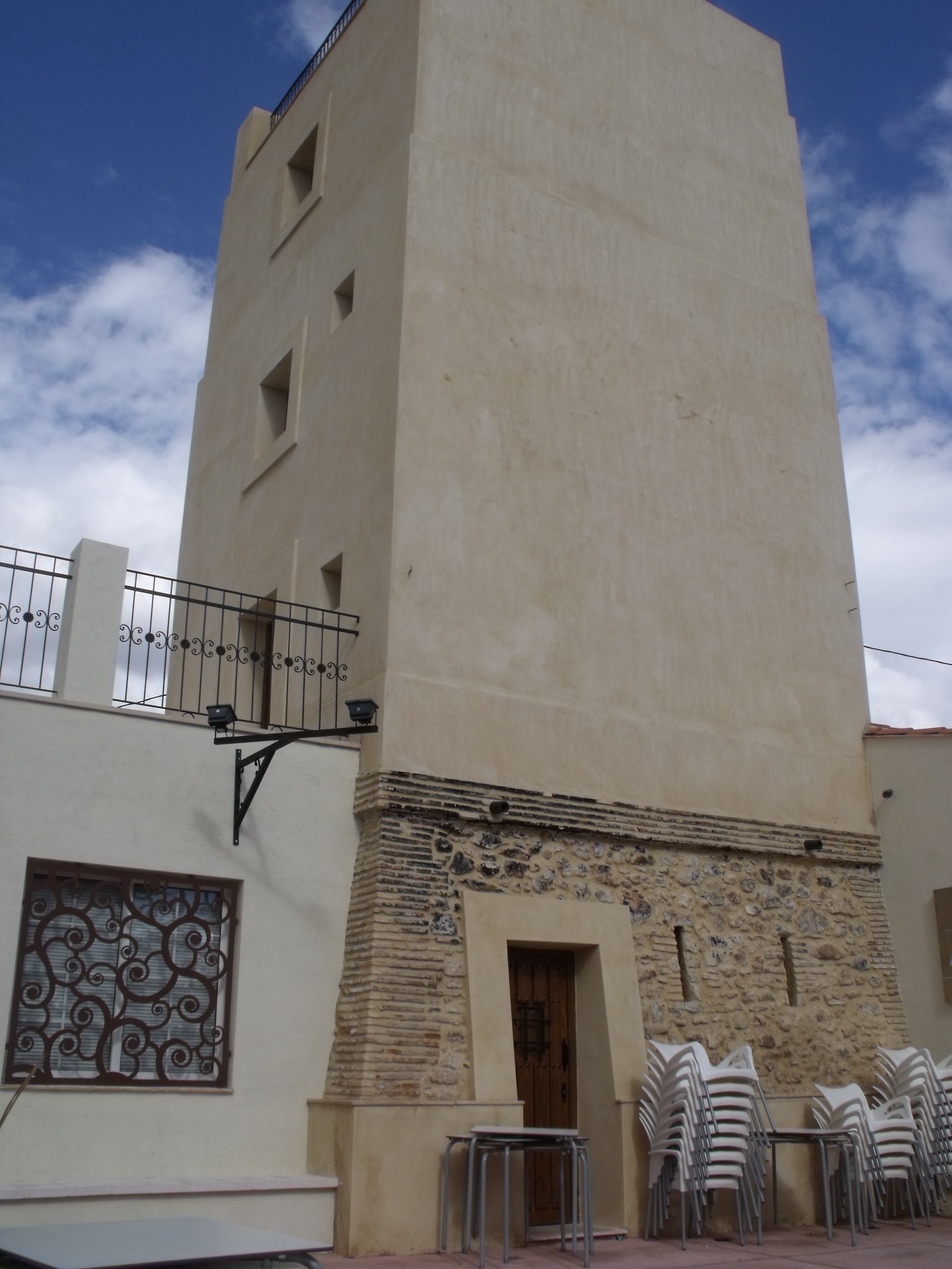 Torre de telegrafía óptica de El Vedat de Torrent.